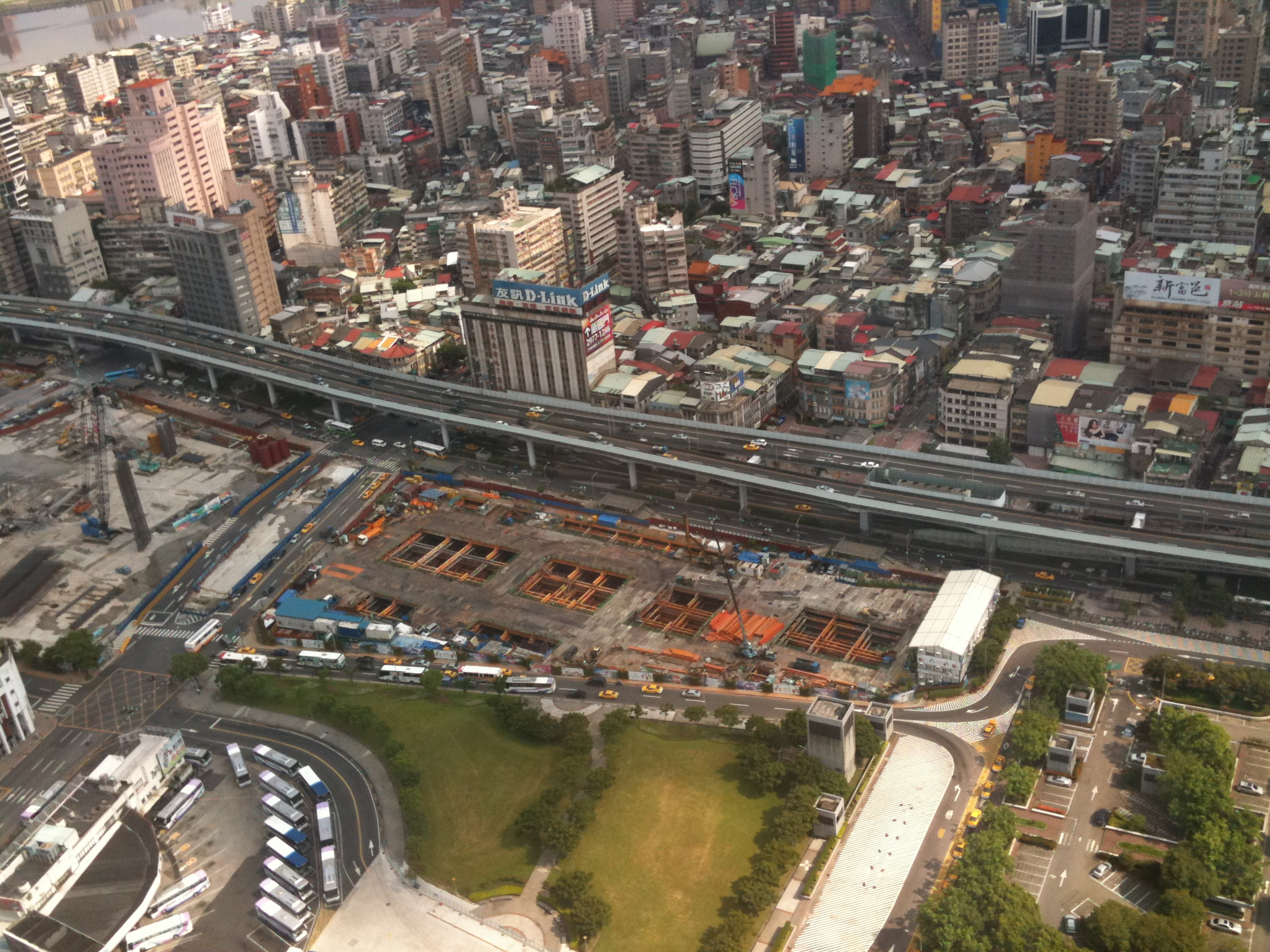 由新光人壽保險摩天大樓俯望市民大道。